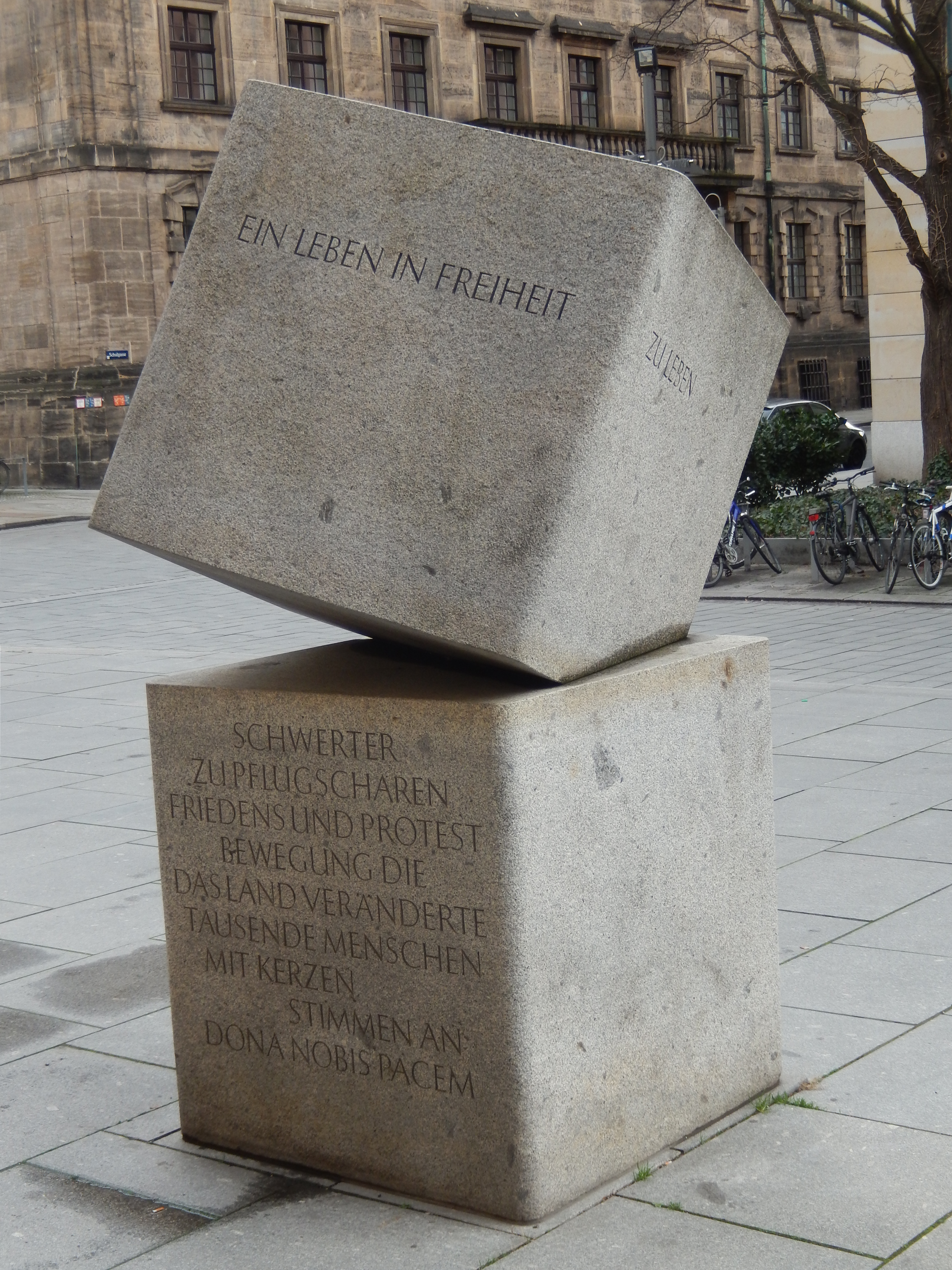 Denkmal: Friedensbewegung in Dresden 1982 am Südportal der Kreuzkirche von Bildhauer Lothar Beck. Installiert 2010 zum Gedenken an den 13. Februar 1982, dem Beginn der Friedensbewegung ohne Partei und Genossen.